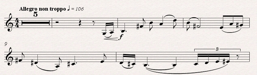 Bartók Béla II. hegedűversenye első tételének a főtémája. Az Universal Edition kiadású kottából begépelve.